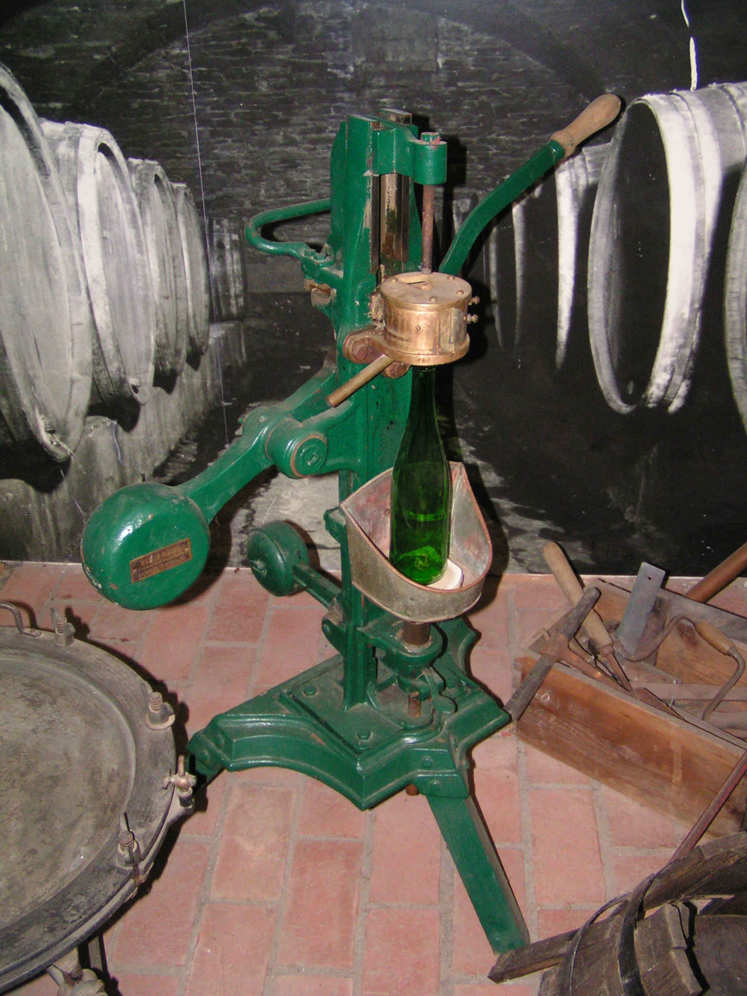 Verkorkungsapparat auf dem Roscheider Hof bei Konz